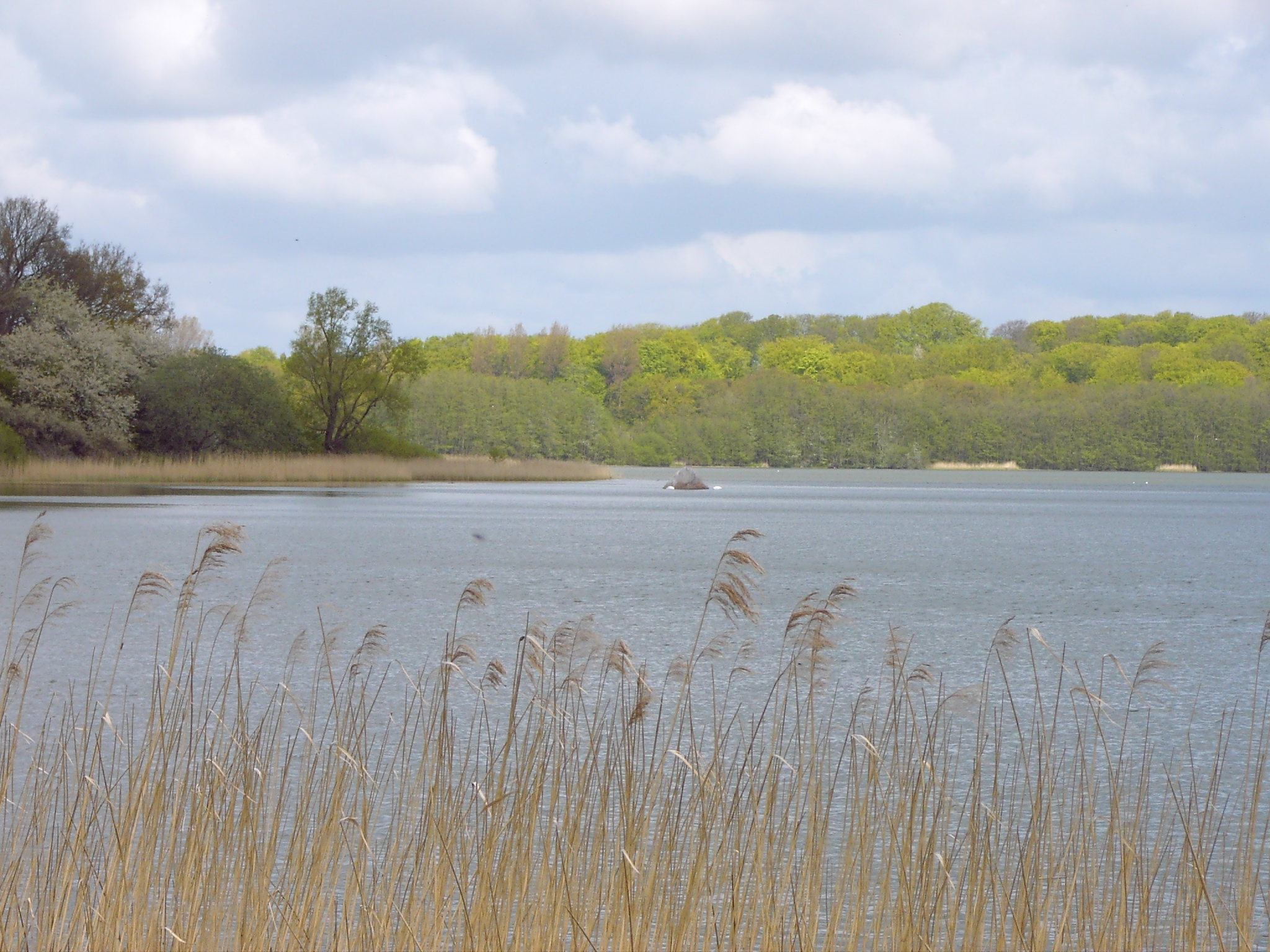 Windebyer Noor